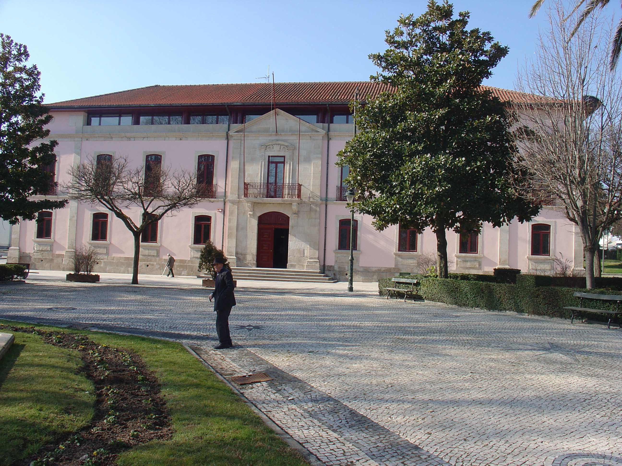 Valpaços-Câmara Municipal